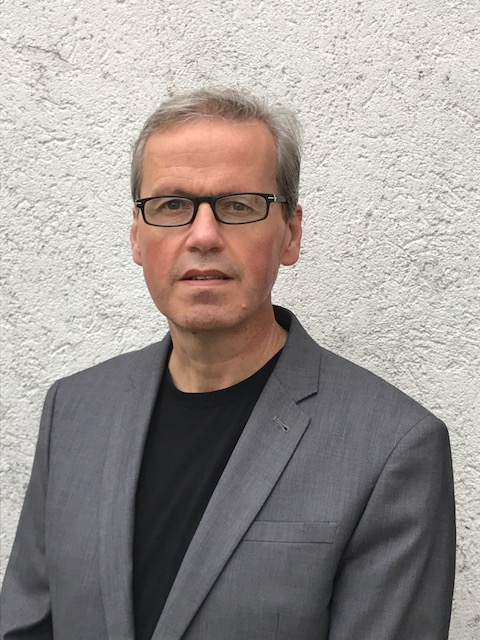 Foto von Thomas Otto, Künstler Worpswede, 2017